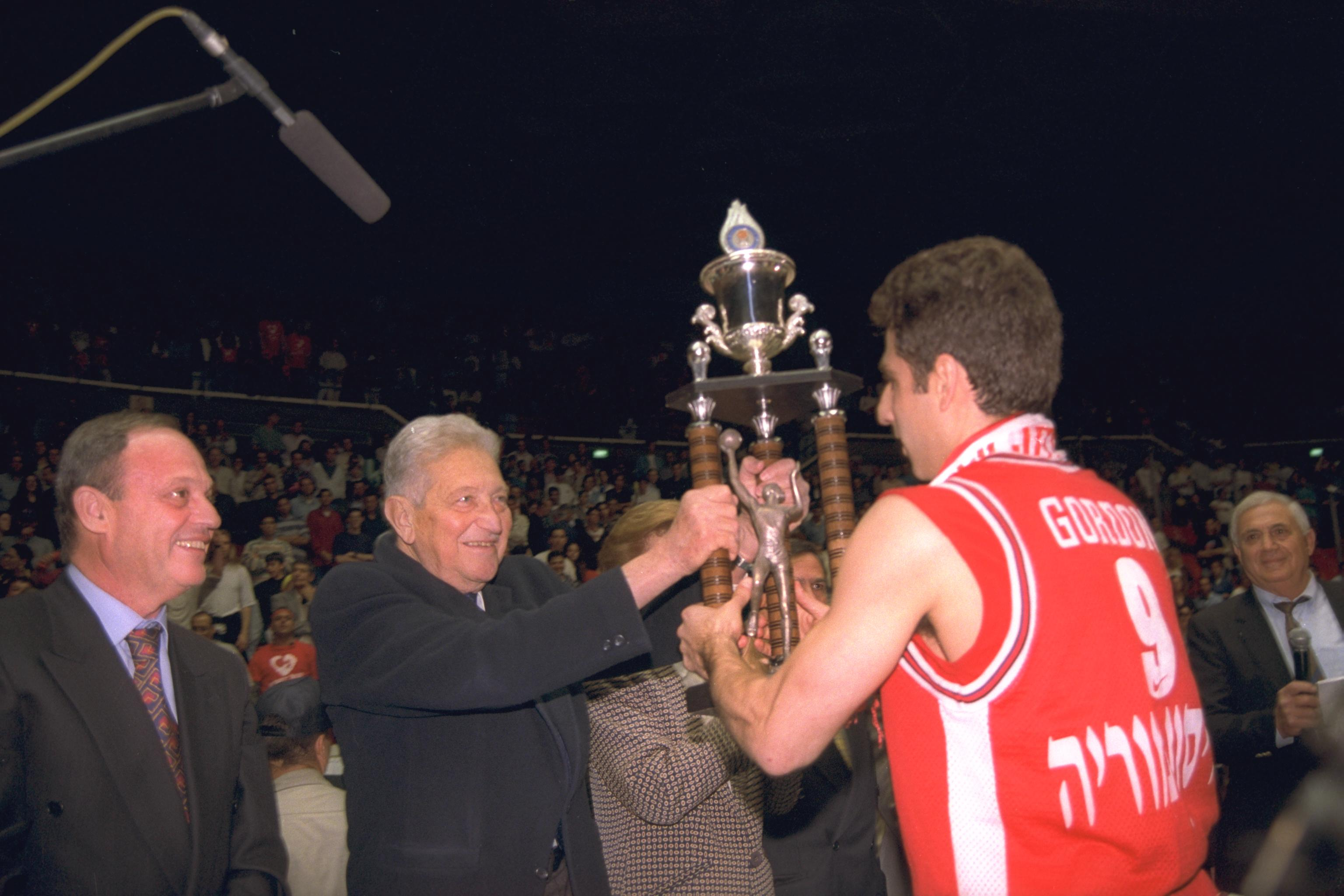 President Ezer Weizman presents the state basketball cup to Hapoel Jerusalem team captain Adi Gordon after his team's victory over Maccabi Tel Aviv in Yad Eliyahu Arena. . נשיא המדינה עזר ויצמן מעניק את גביע המדינה בכדורסל לקפטיין הפועל ירושלים, עדי גורדון, לאחר נצחון הפועל ירושלים על מכבי תל אביב, באולם הספורט ביד אליהו. Photo: YARON AVNER, 04/19/1996